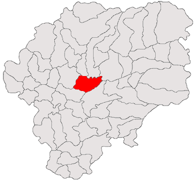 Categorie:Hărţi ale judeţului Bistriţa-Năsăud